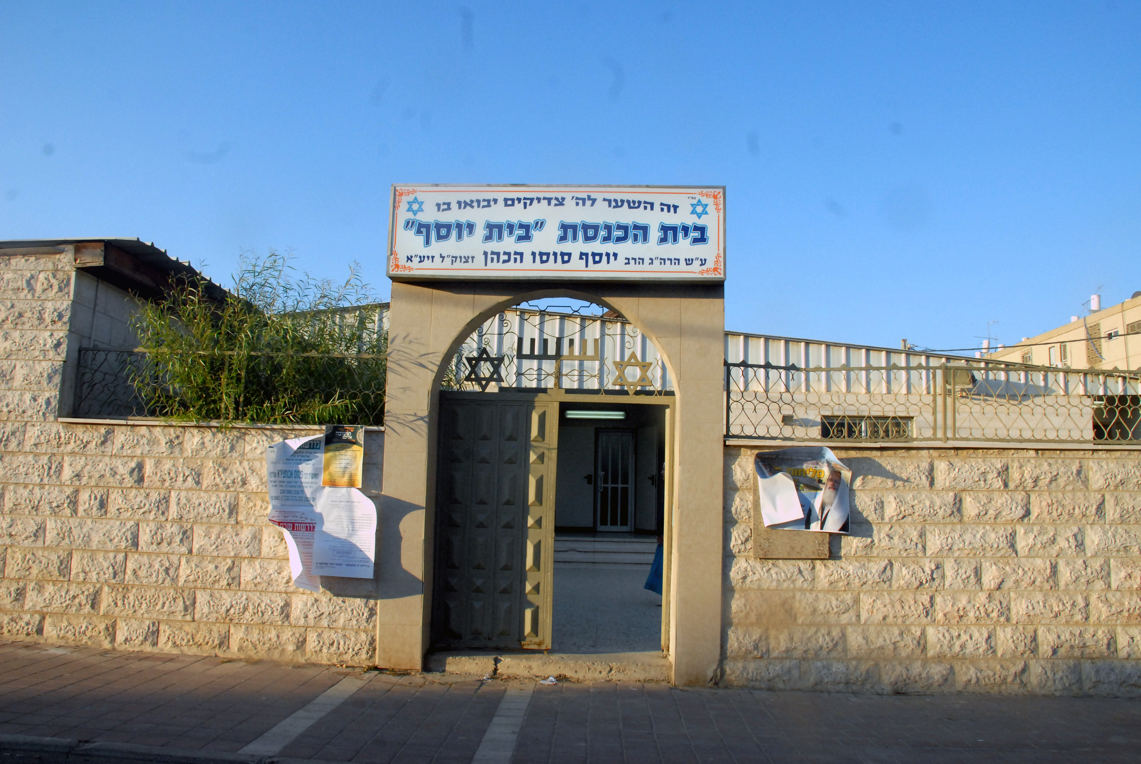 חזית בית הכנסת "בית יוסף" ע"ש הרב יוסף סוסו הכהן